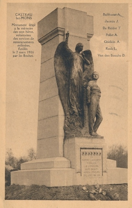 Mémorial 7 fusillés du 2 mars 1916 (CPA 1928) - Jules Jourdain